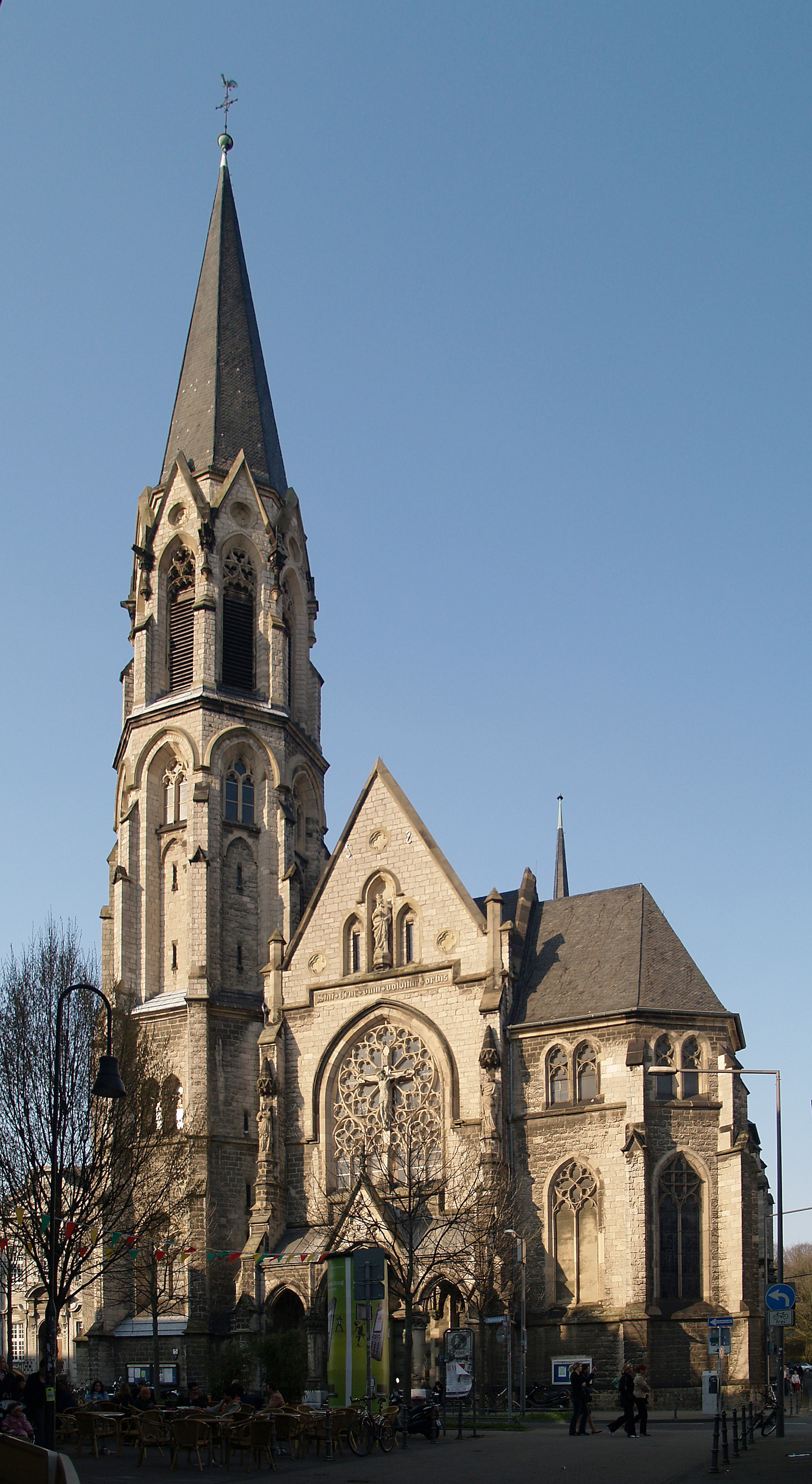 Heilig Kreuz in Aachen